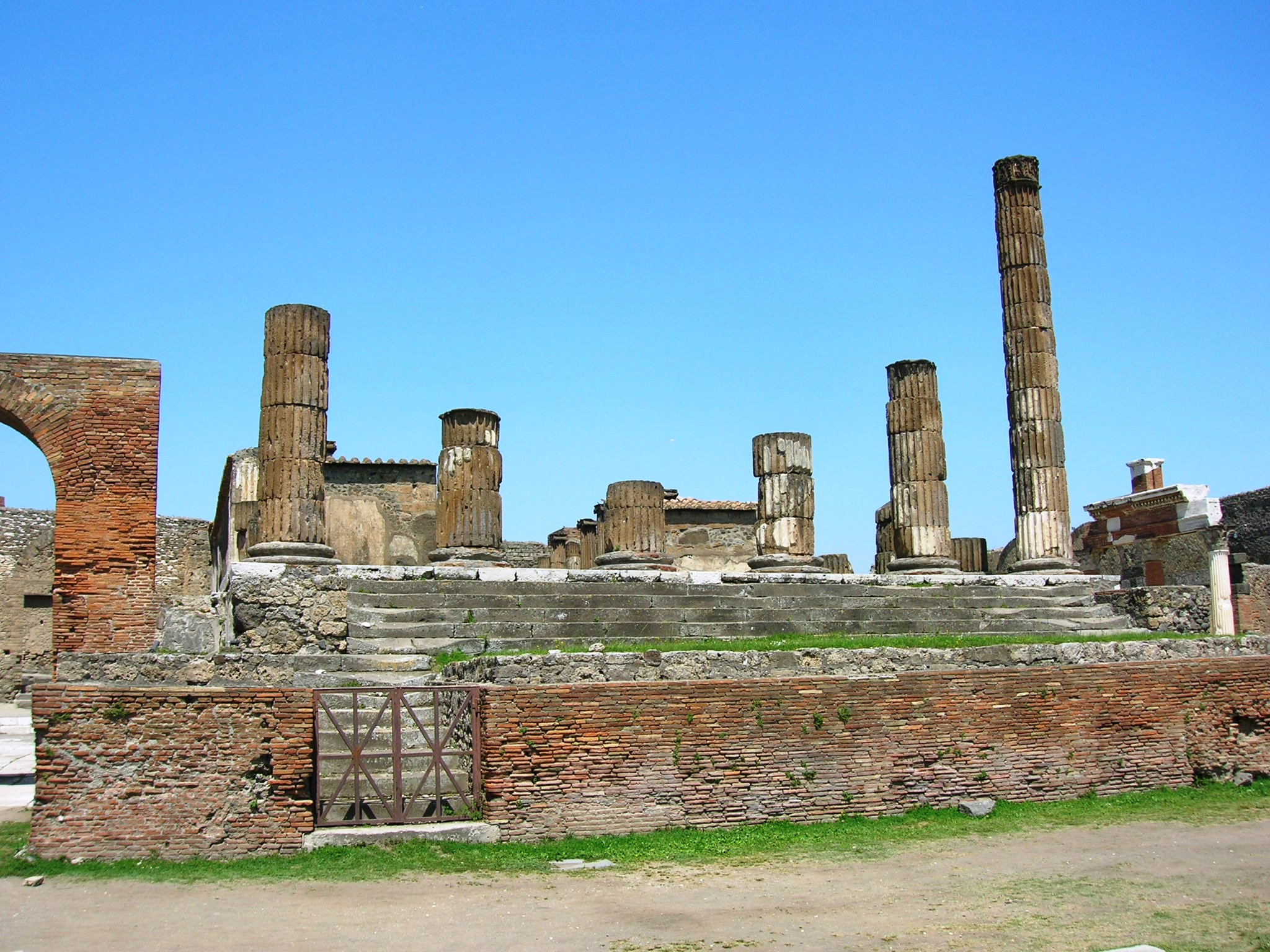 Il Tempio di Giove a Pompei